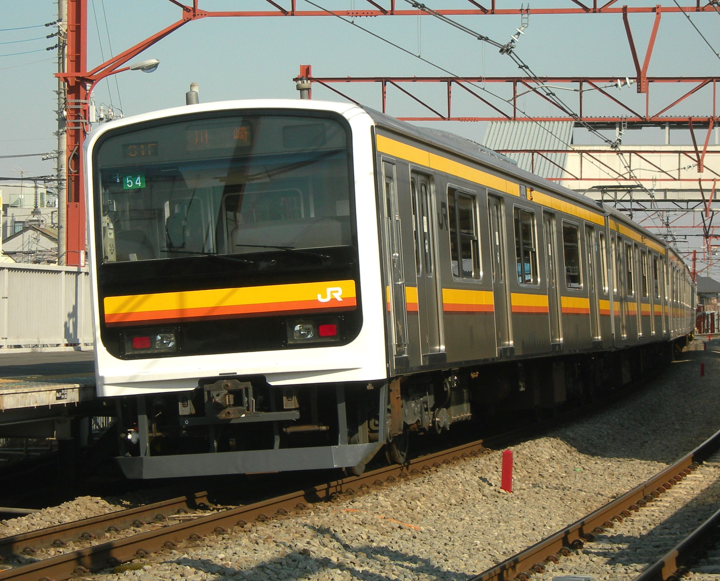 209系2200番台（ナハ54編成）